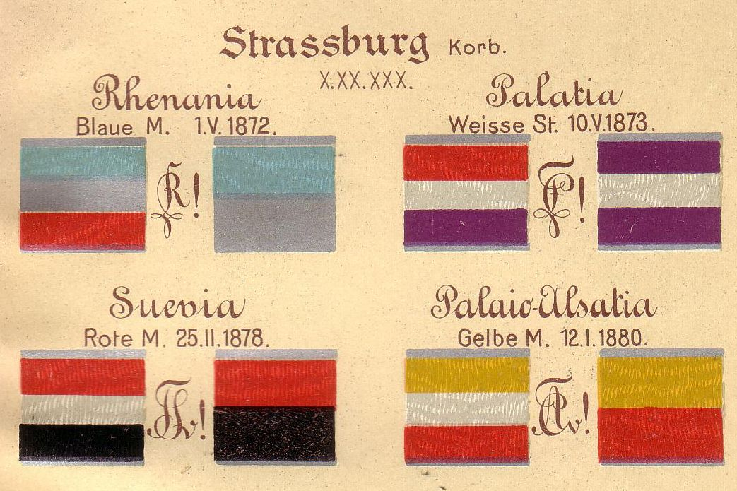 Couleur und Zirkel der Straßburger Corps